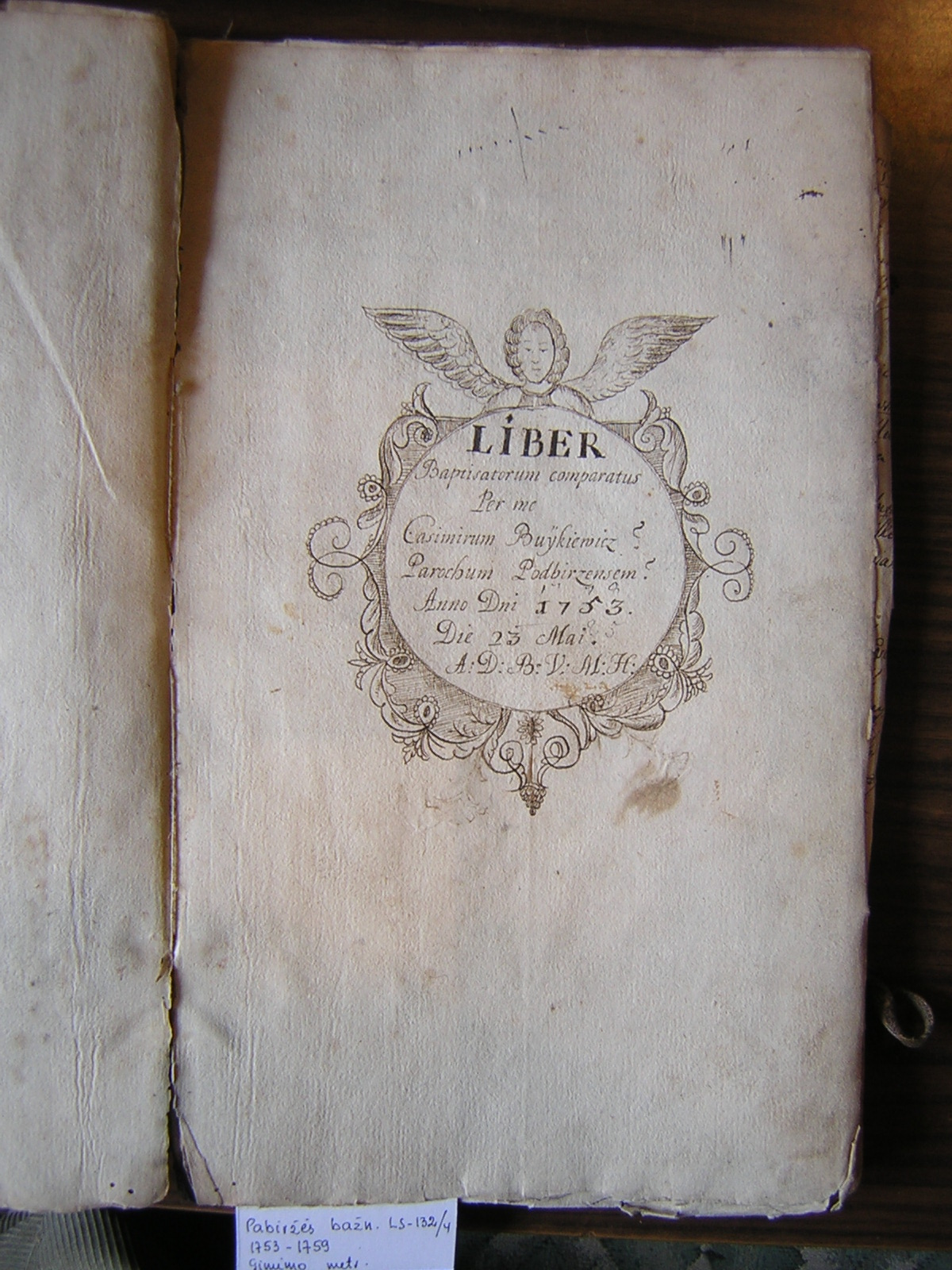 Pabiržės bažn. 1753-1759 gimimo metrikų knygos titulis puslapis